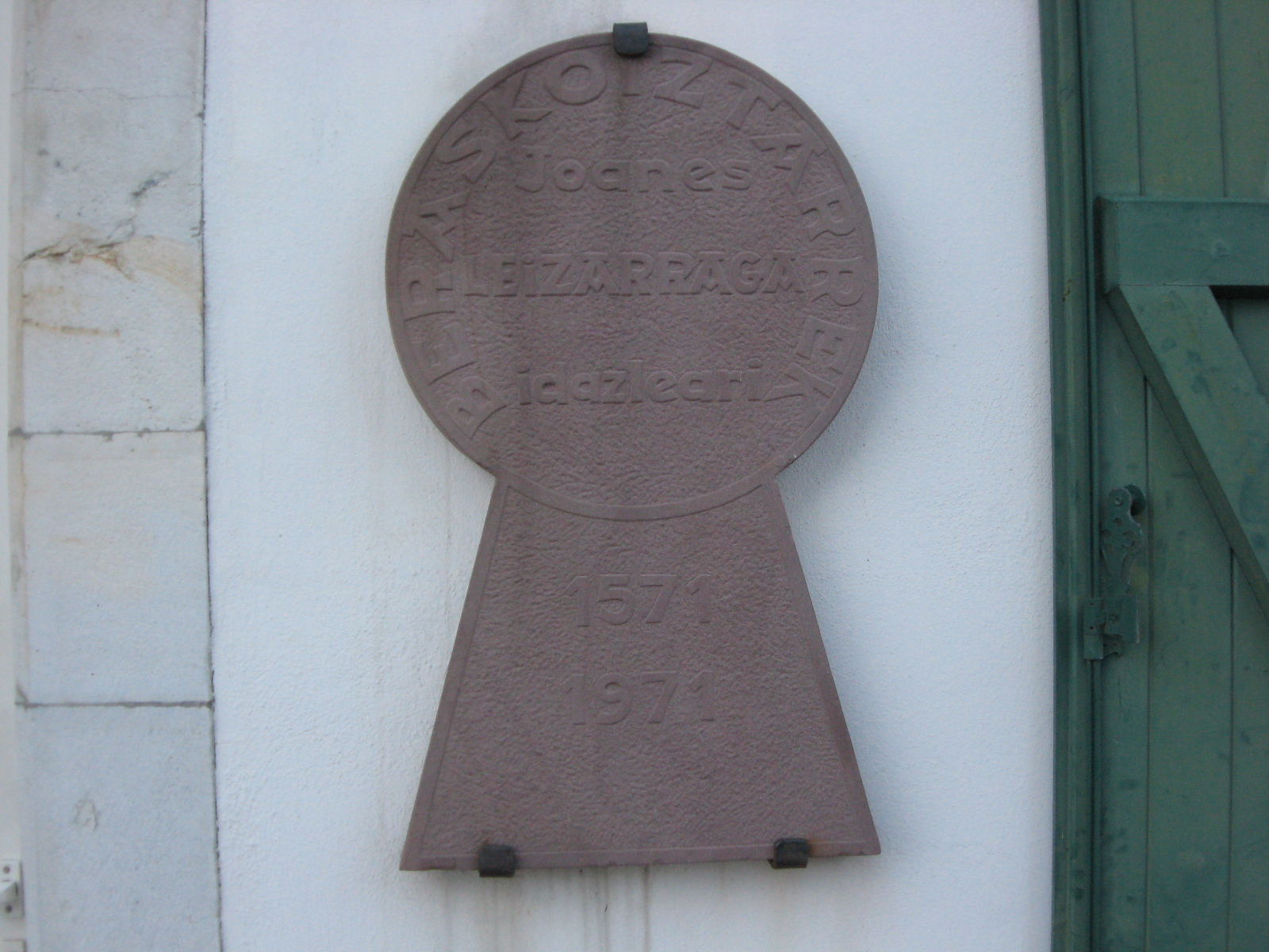 Plaque en basque à la mairie de Briscous (Pyrénées-Atlantiques) (Pyrénées).